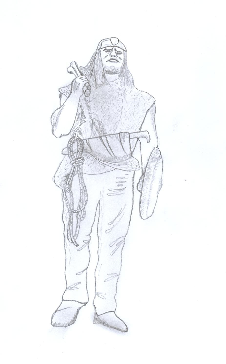 Альмогавар